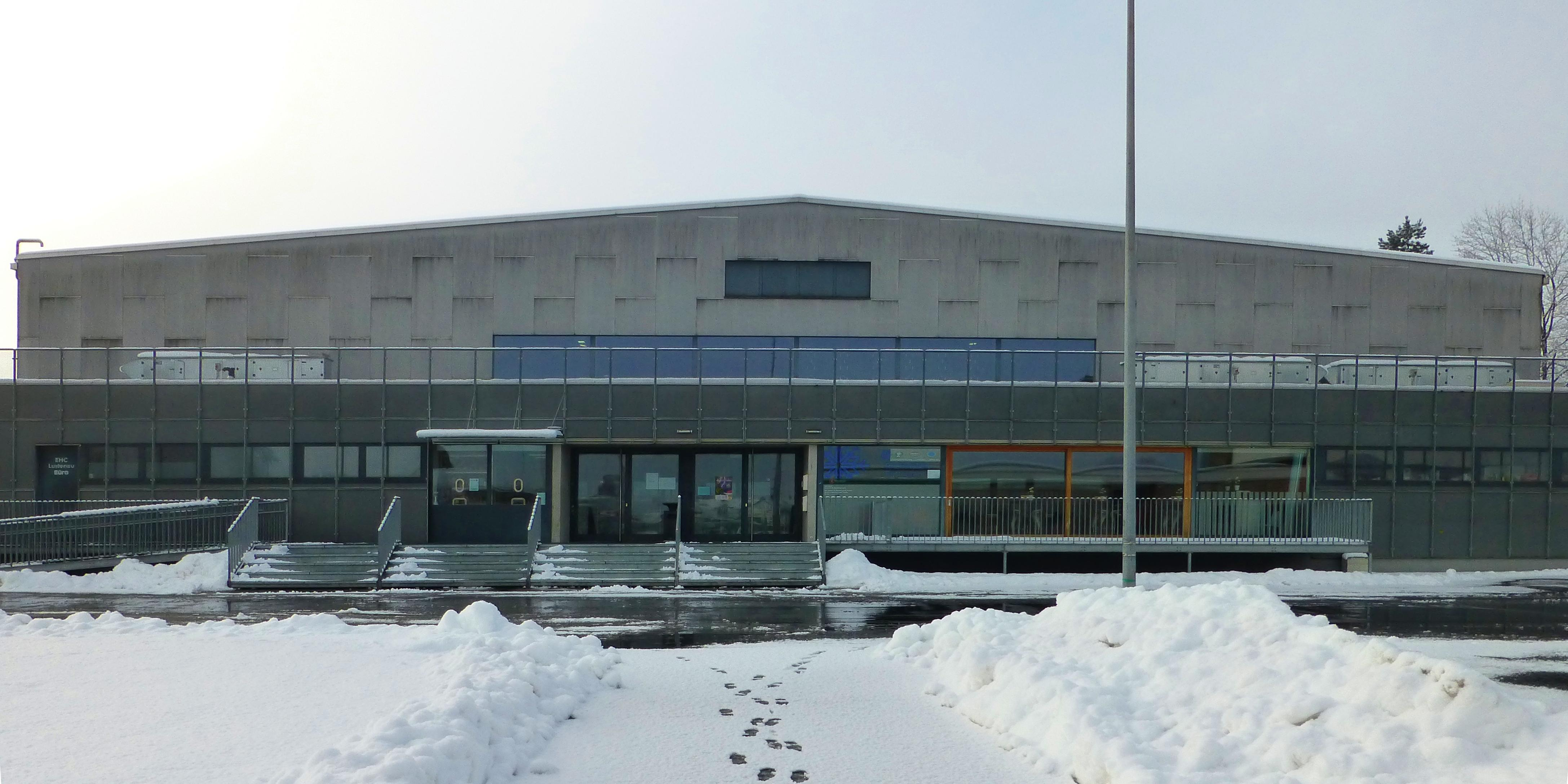 Die Rheinhalle, die Eislaufhalle in Lustenau und Heimstätte des EHC Lustenau